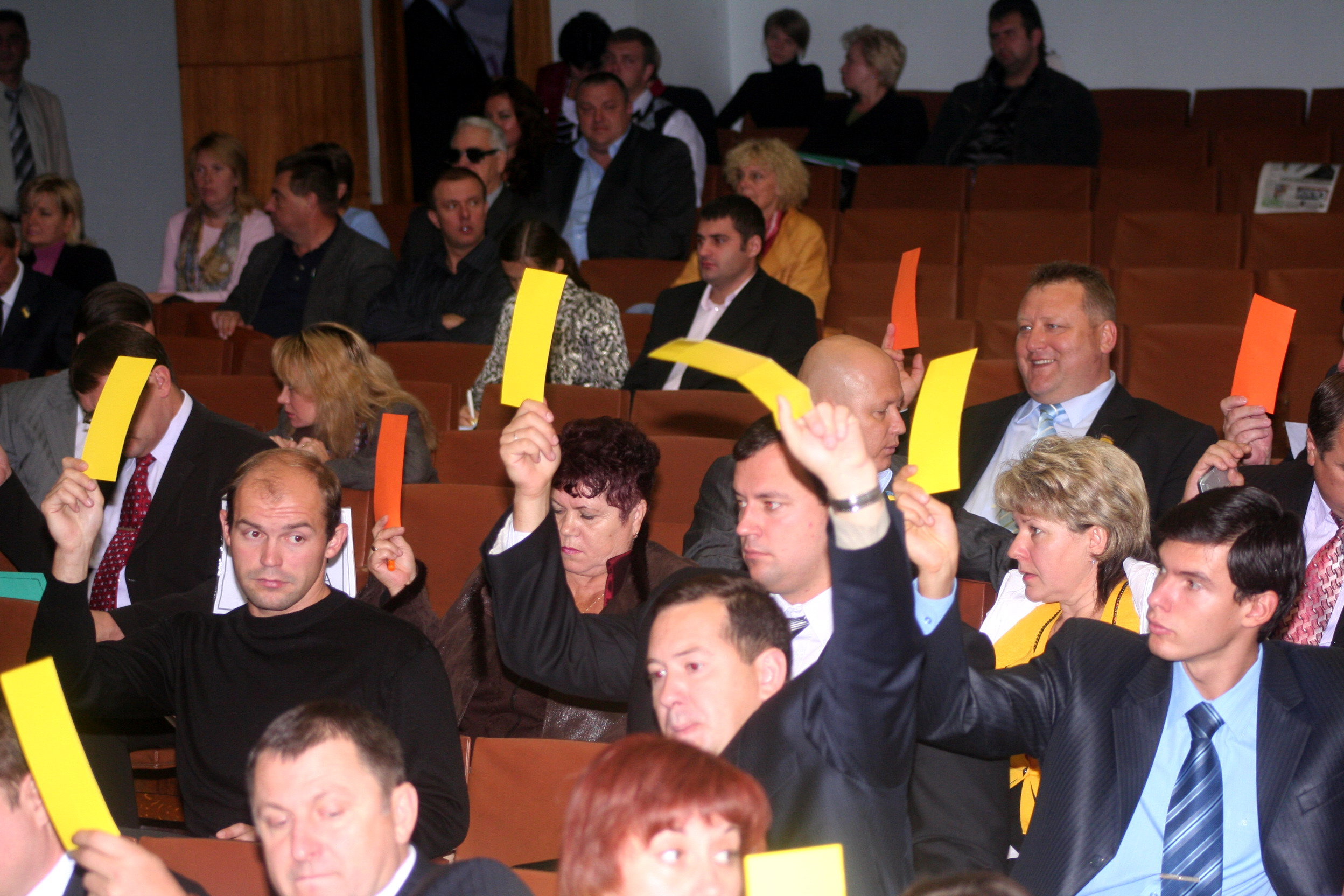 2009 рік